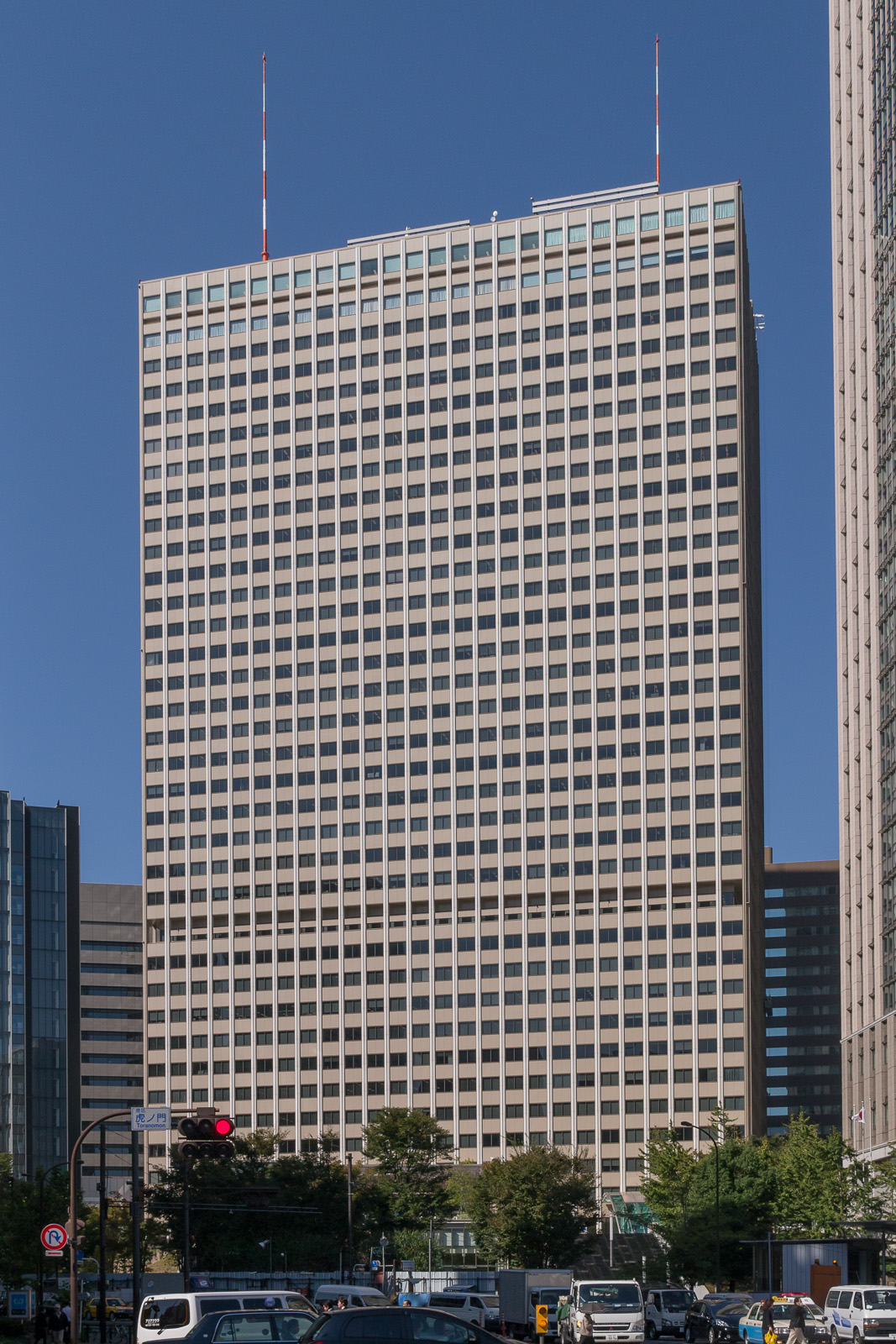 霞が関ビル、東京都千代田区霞が関。